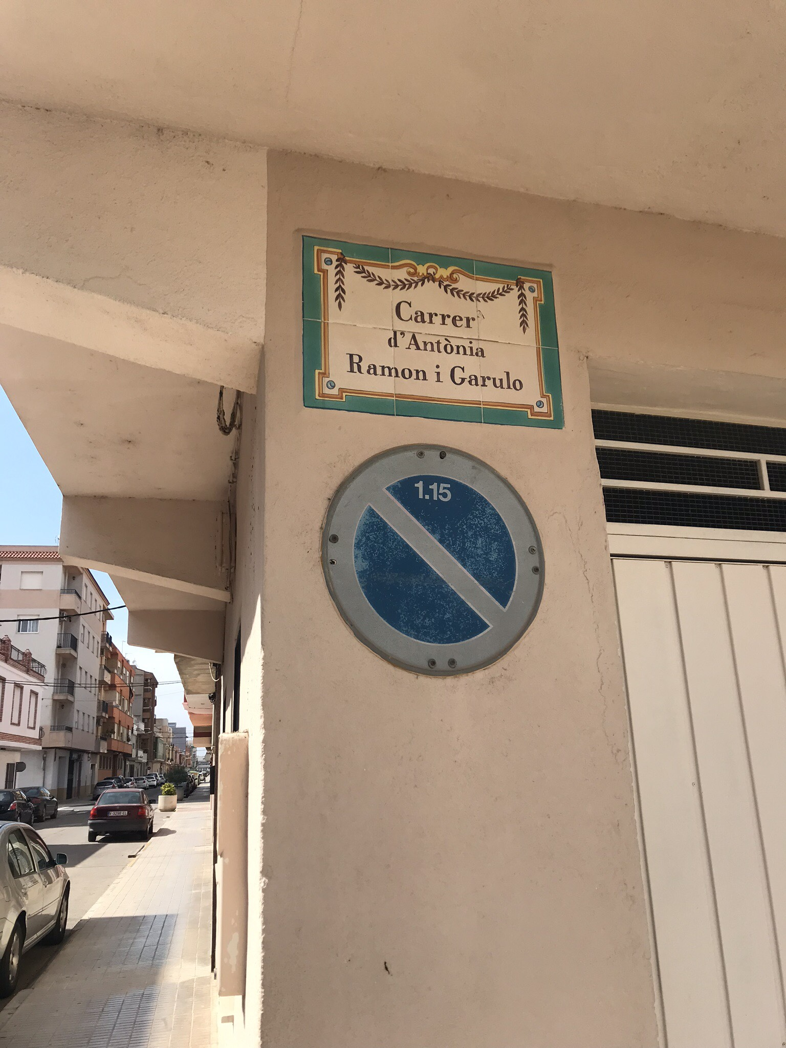 Placa del carrer Antònia Ramon i Garulo